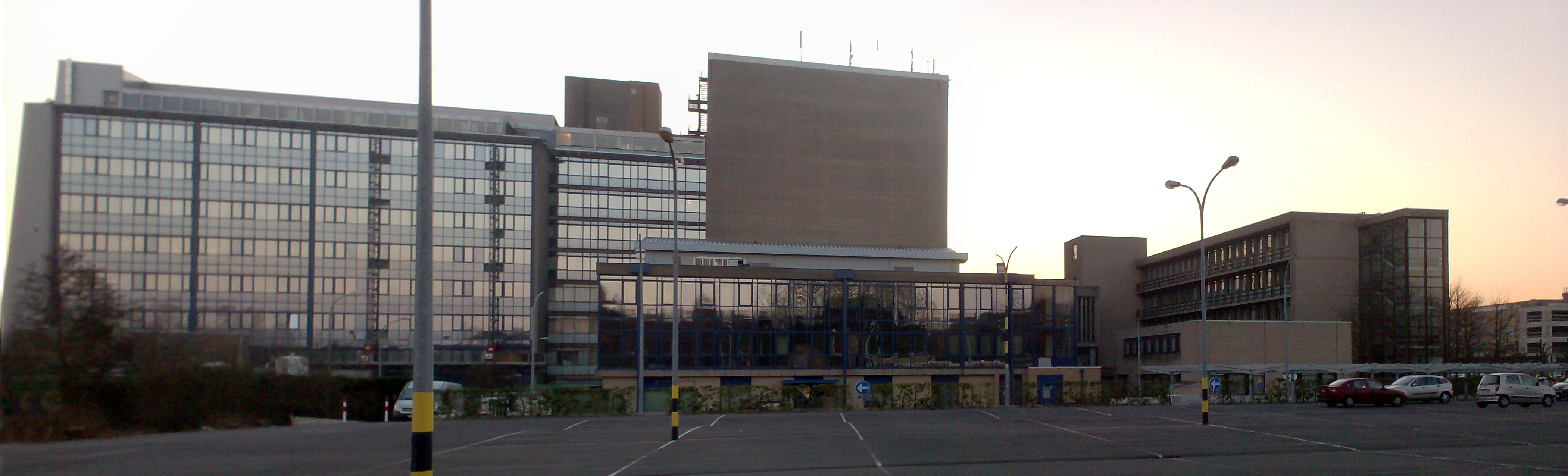 Het AZ Sint-Lucas in Brugge